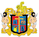 Escudo de Jiménez, Tamaulipas